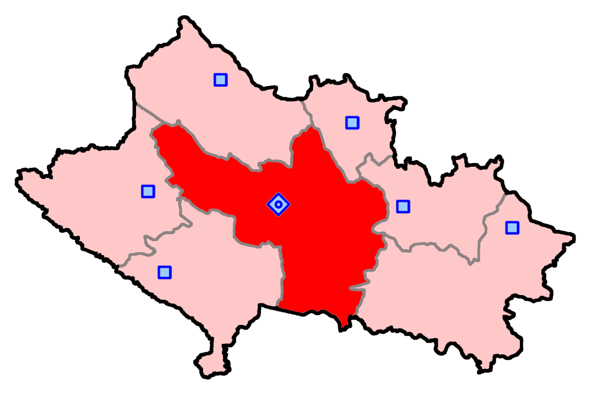 حوزه‌ خرم آباد برای انتخابات مجلس شورای اسلامی